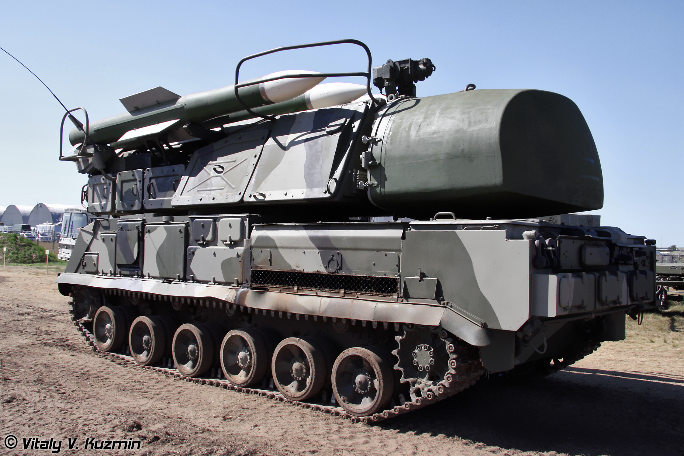 Самоходная огневая установка 9А310 ЗРК Бук-М1-2 (9A310 self-propelled launch vehicle for Buk-M1-2 Air defence system)